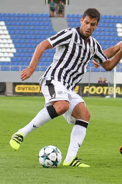 Євген Шахов - український футболіст ПАОКа